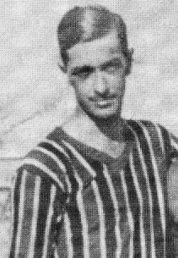 Araken Patusca (São Paulo FC), 1933